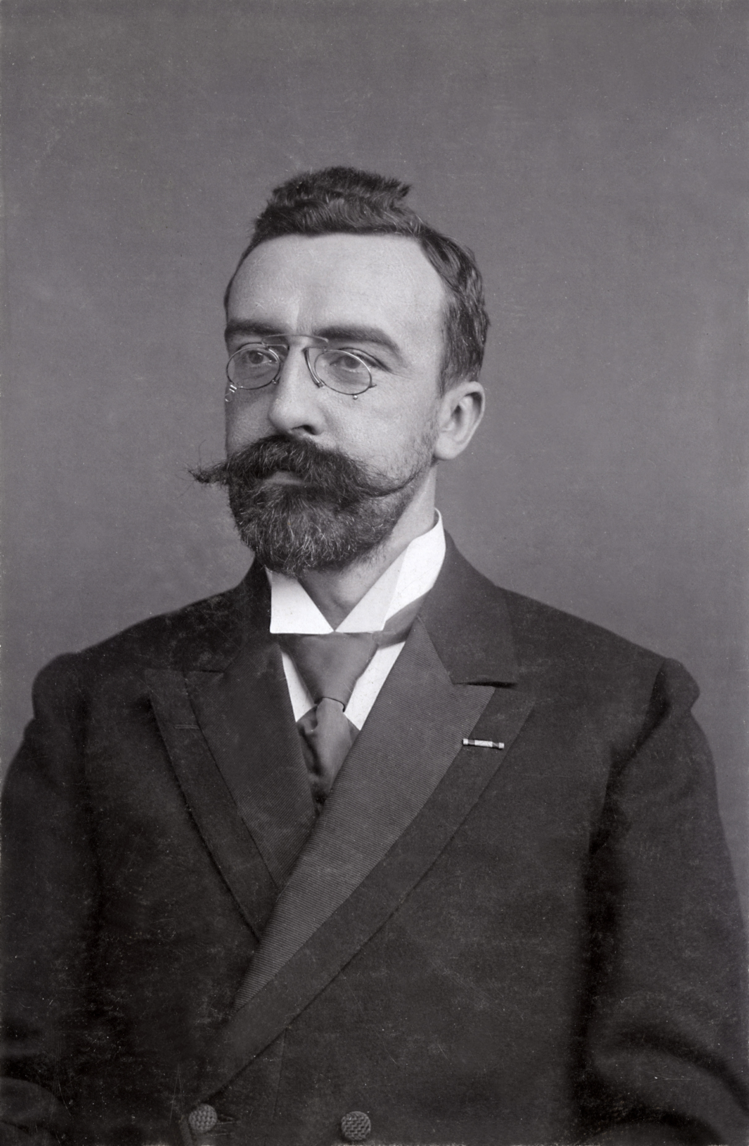 Portret van Prof. Mr. P.J.M. (Piet) Aalberse 1871-1948, Minister van Arbeid van 1918-1922, en Minister van Arbeid, Handel en Nijverheid van 1922-1925. Hij was lid van de Algemeene bond van RK-Kiesverenigingen de latere Roomsch-Katholieke Staatspartij(RKSP) Na 1945 de KVP. Datum: vóór 1913